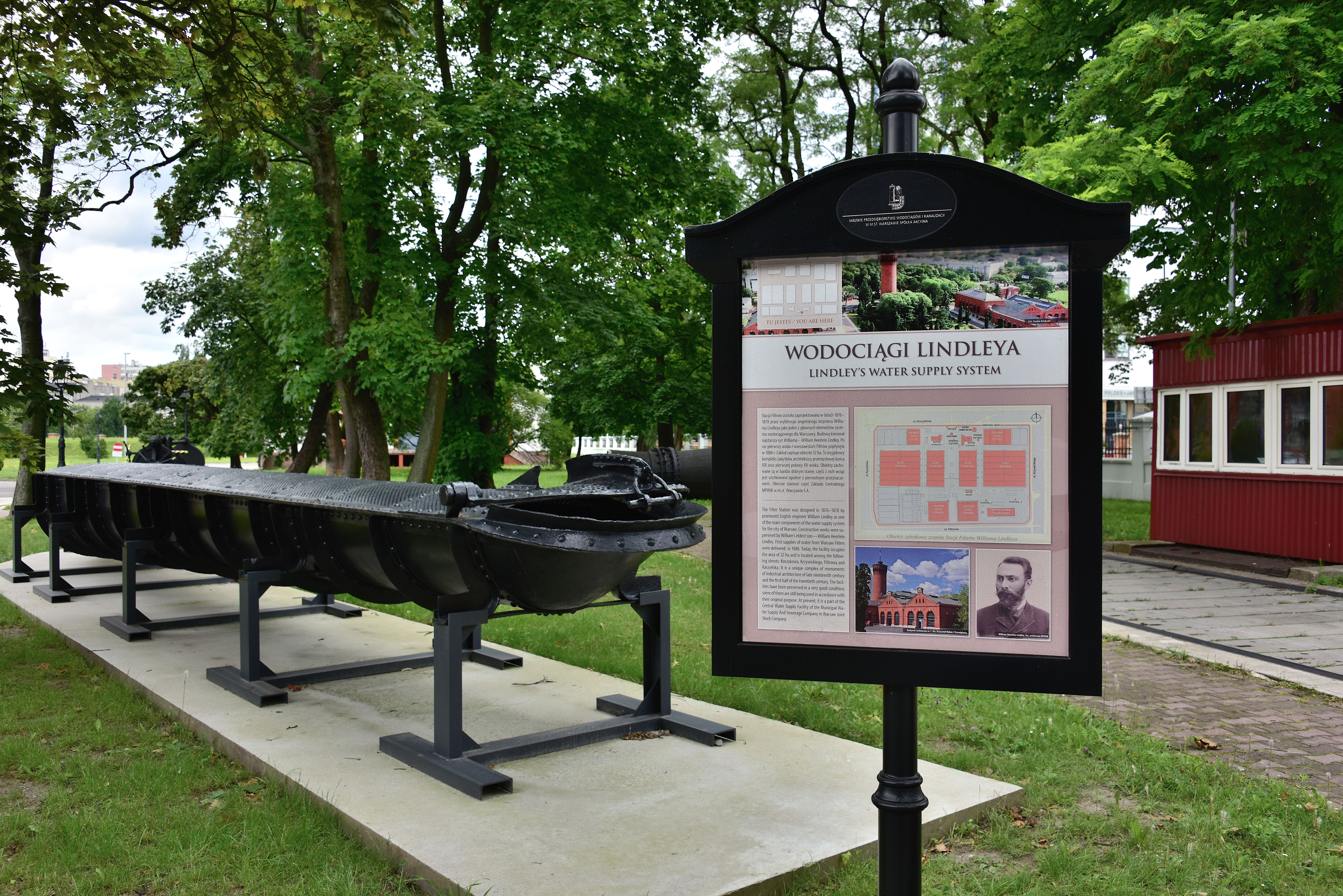 Zespół Stacji Filtrów przy ul. Koszykowej 81 w Warszawie